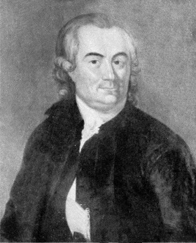 Bild scannad ur Aaron Isaacs minnen. En judisk kulturbild fr�n gustaviansk stil, utg. H. Valentin & A. Brody (Stockholm 1932). Ingen fotograf angiven. 22 juli 2004 kl.00.34 Tupsharru 280x348 (37155 bytes)